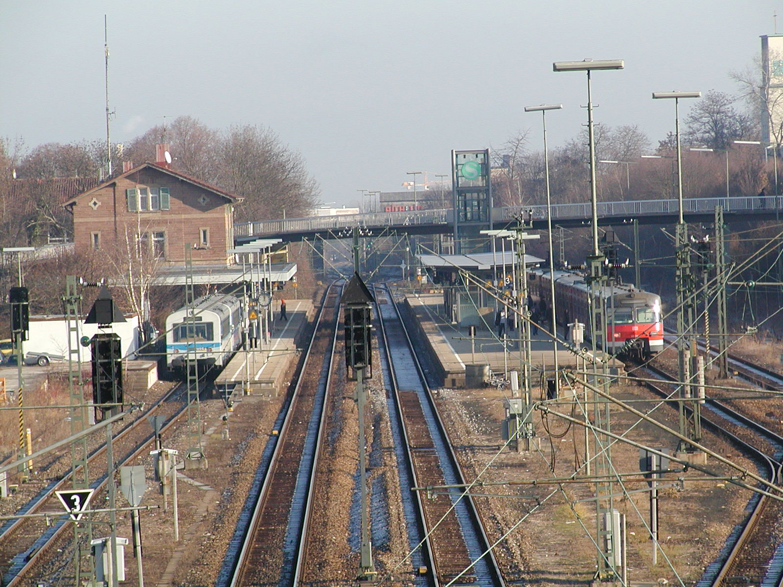 Korntal, der Bahnhof von der Brücke aus gesehen, Mit 2 NE 81 Garnituren von 1993